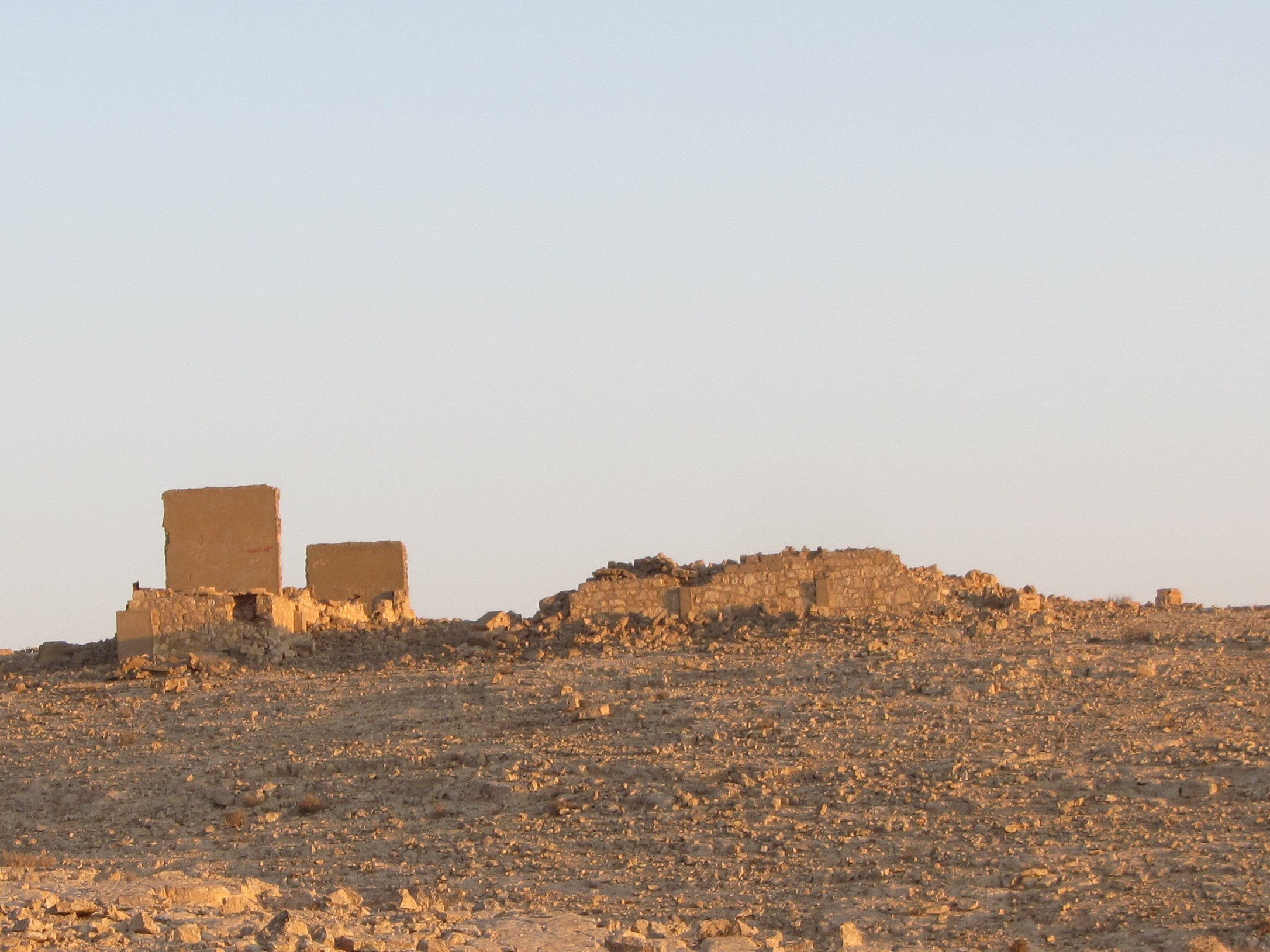 בסיס בטון למגדל קידוח נפט. נמצא על קטע דרך סולינג בריטית למחפשי הנפט אשר הגיעו ממחנה מחפשי הנפט ליד הר אבנון.